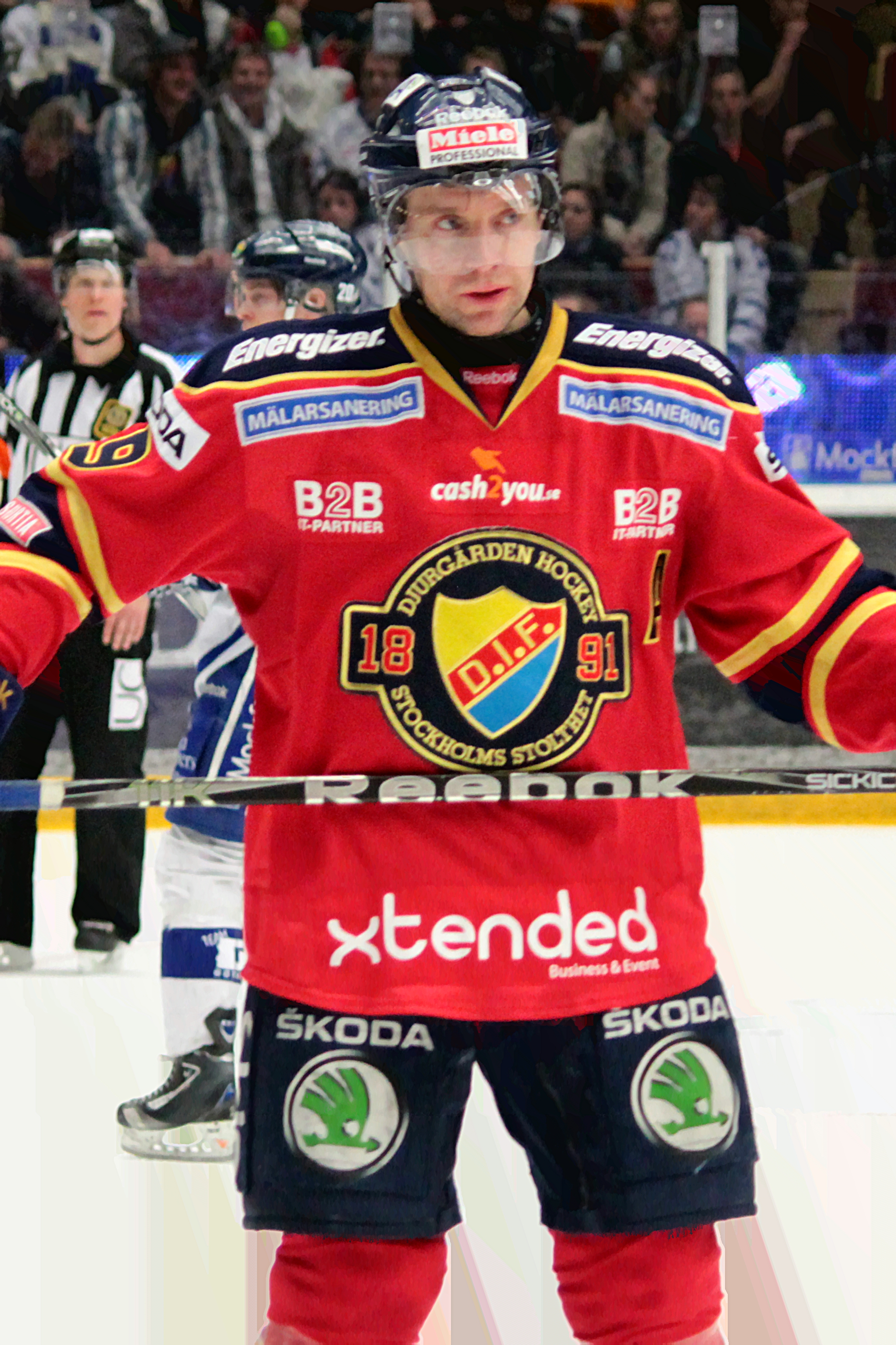 Kristofer Ottosson i kvalmatchen mellan Leksands IF och Djurgårdens IF i Leksand 2012-03-31